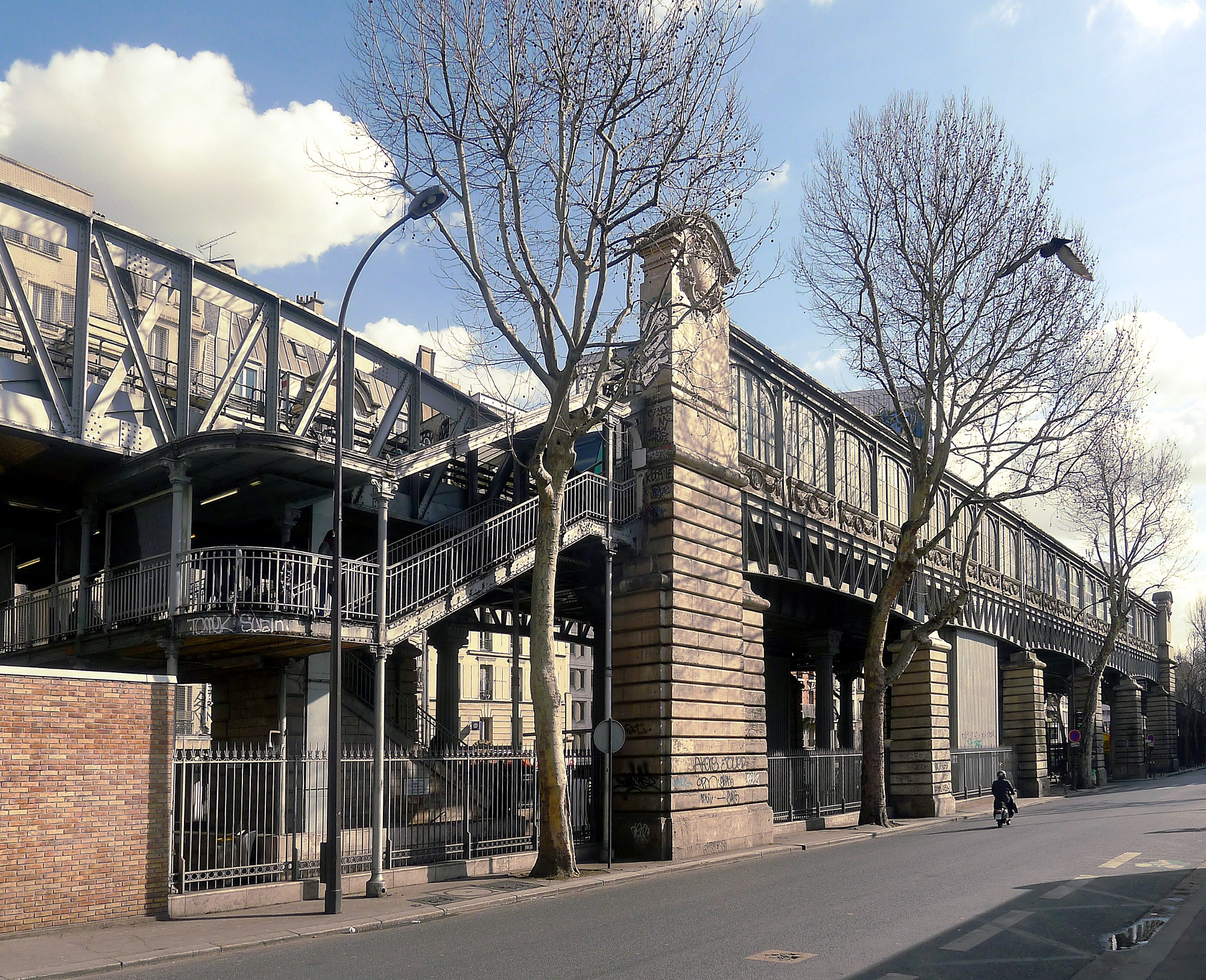 station de métro Jaurès sur le boulevard de la Villette - Paris X